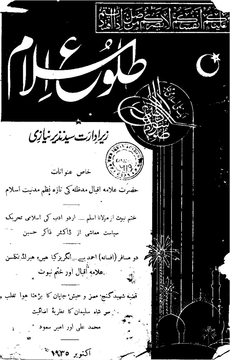 Tolu-e-Islam